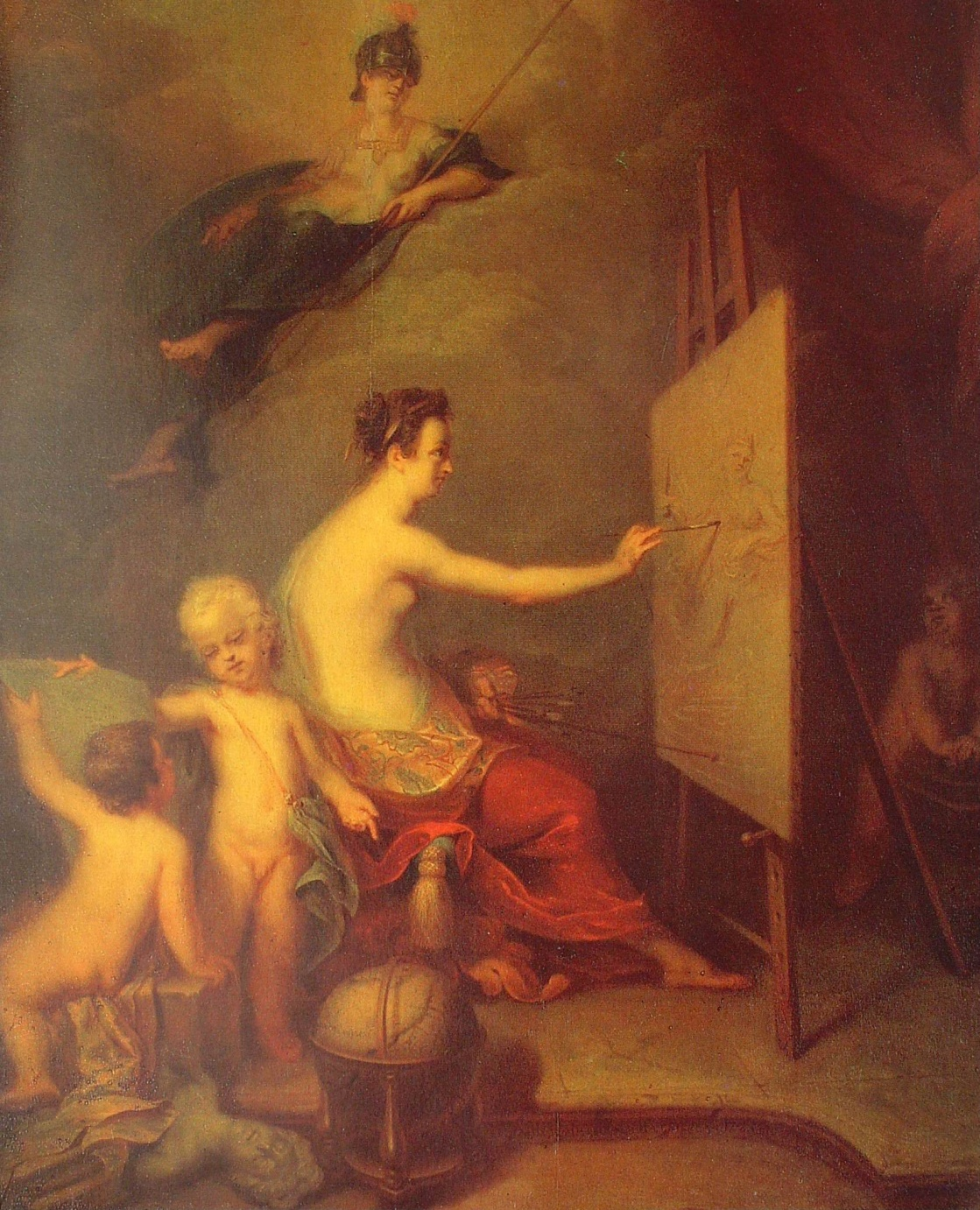 Матвеев А.М. Аллегория живописи, год написания картины: 1725 г. , размеры картины: 69,5х57,5см, музей: Государственный Русский музей Дерево, масло. 69,5 х 57,5